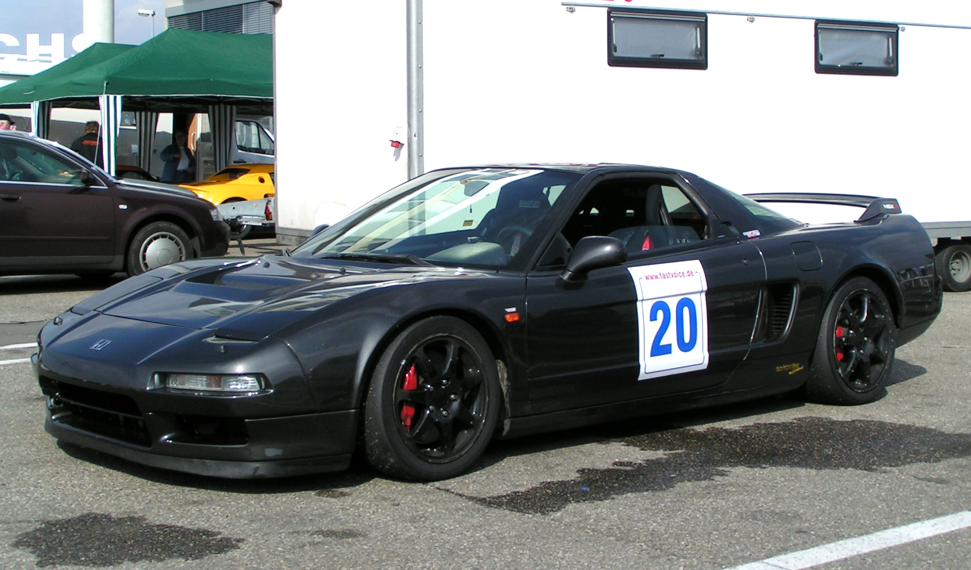 Modified Honda NSX at Hockenheim Fahrerlager